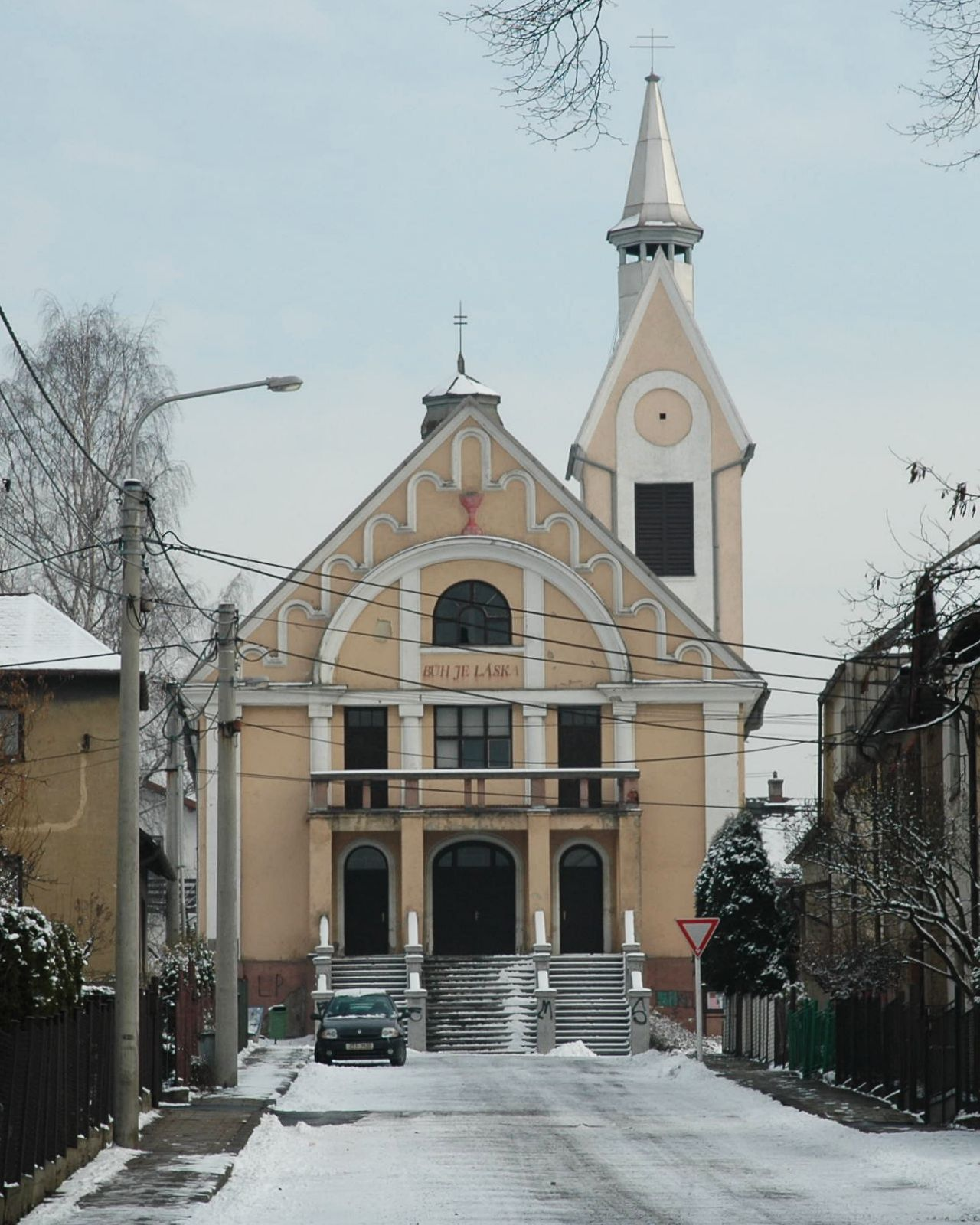 Husův sbor Ostrava-Radvanice